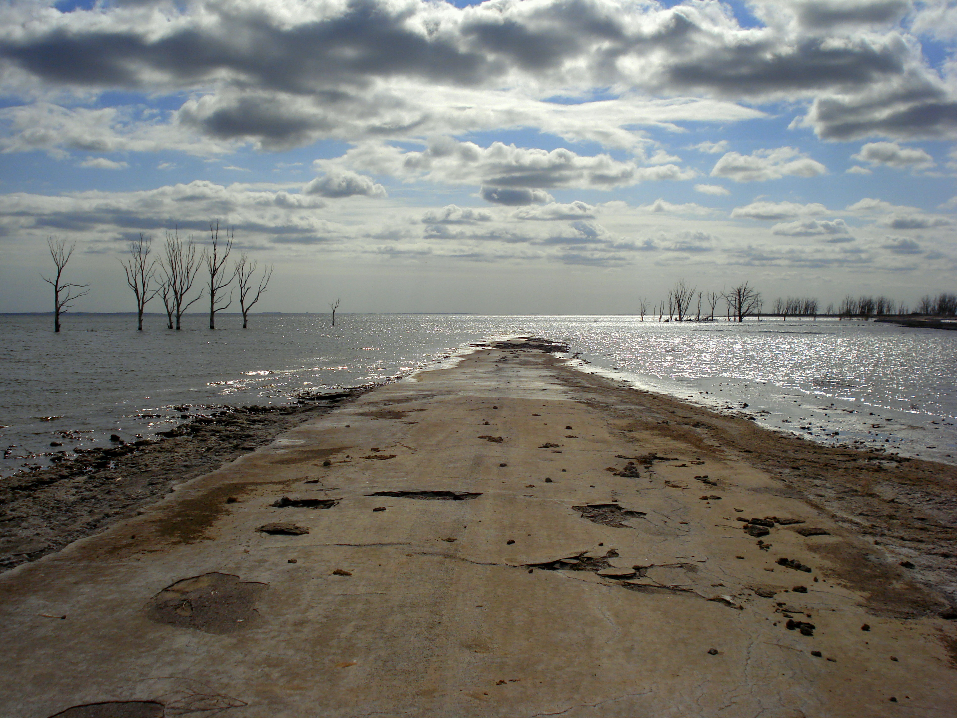 Partido de Adolfo Alsina, Provincia de Buenos Aires